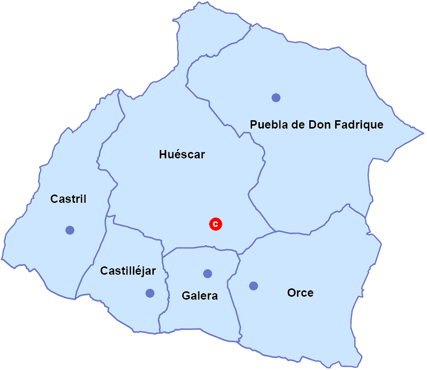 Mapa de la Comarca de Huéscar, en la provincia de Granada (España).